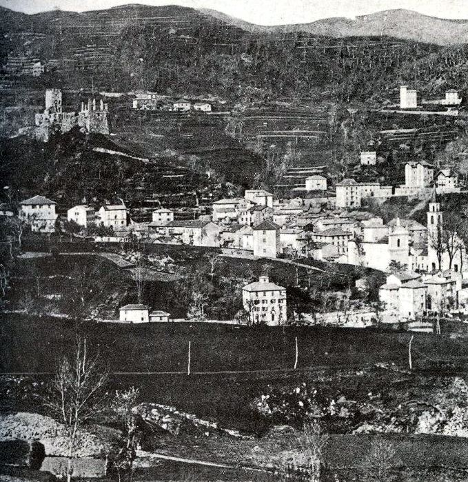 Panorama di inizio Novecento di Torriglia, Liguria, Italia